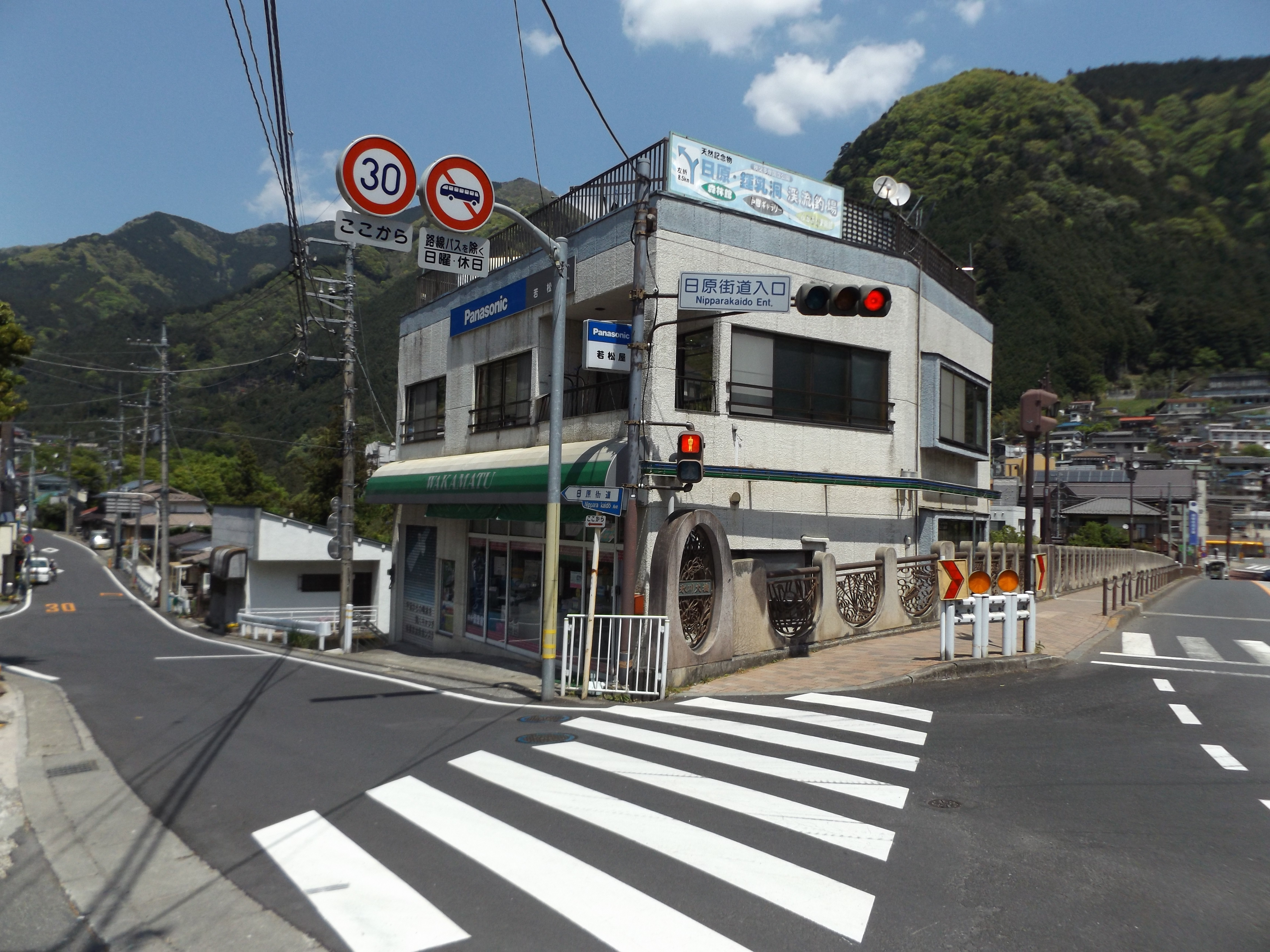 東京都西多摩郡奥多摩町にある、東京都道204号日原鍾乳洞線の起点である日原街道入口交差点。